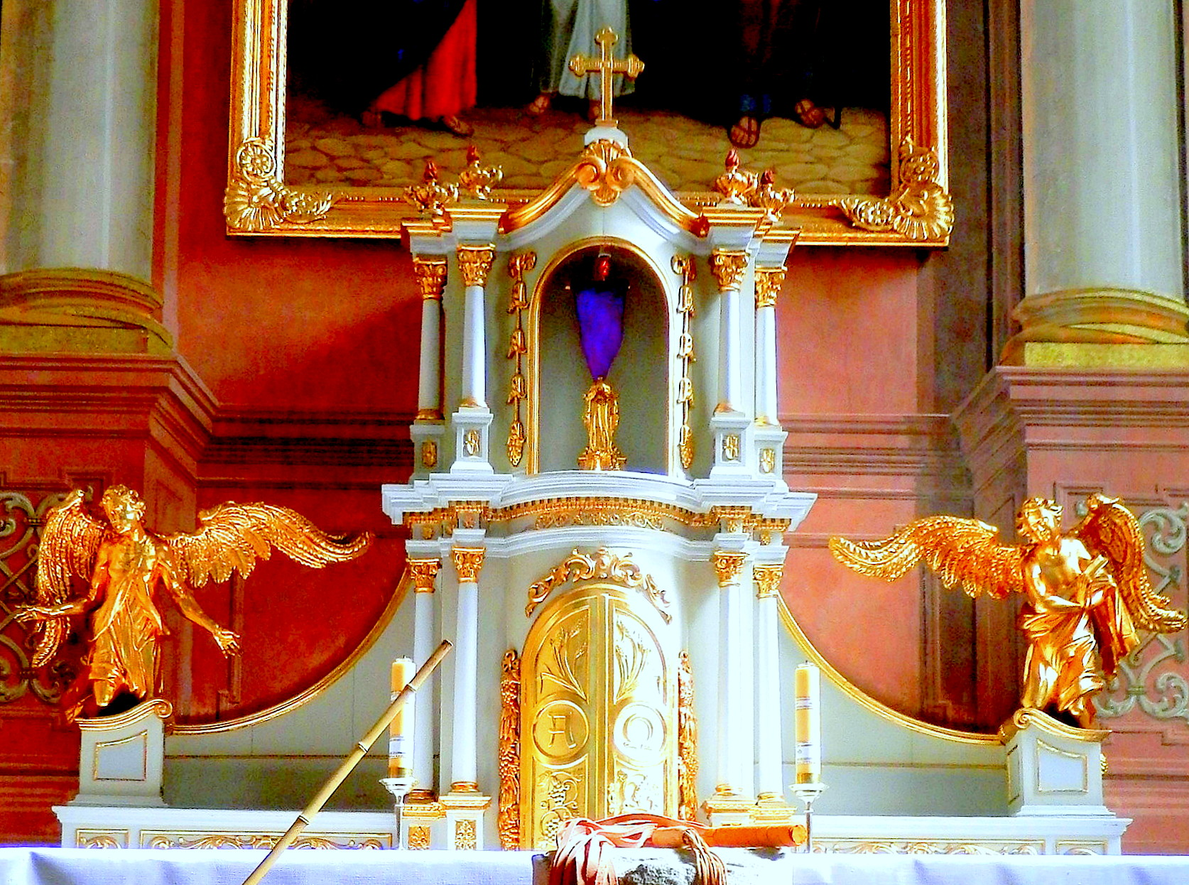 Streda 23.3.2016, kostol svätého Jozefa (Františkáni), veľkonočná výzdoba interiéru. Mesto Prešov.